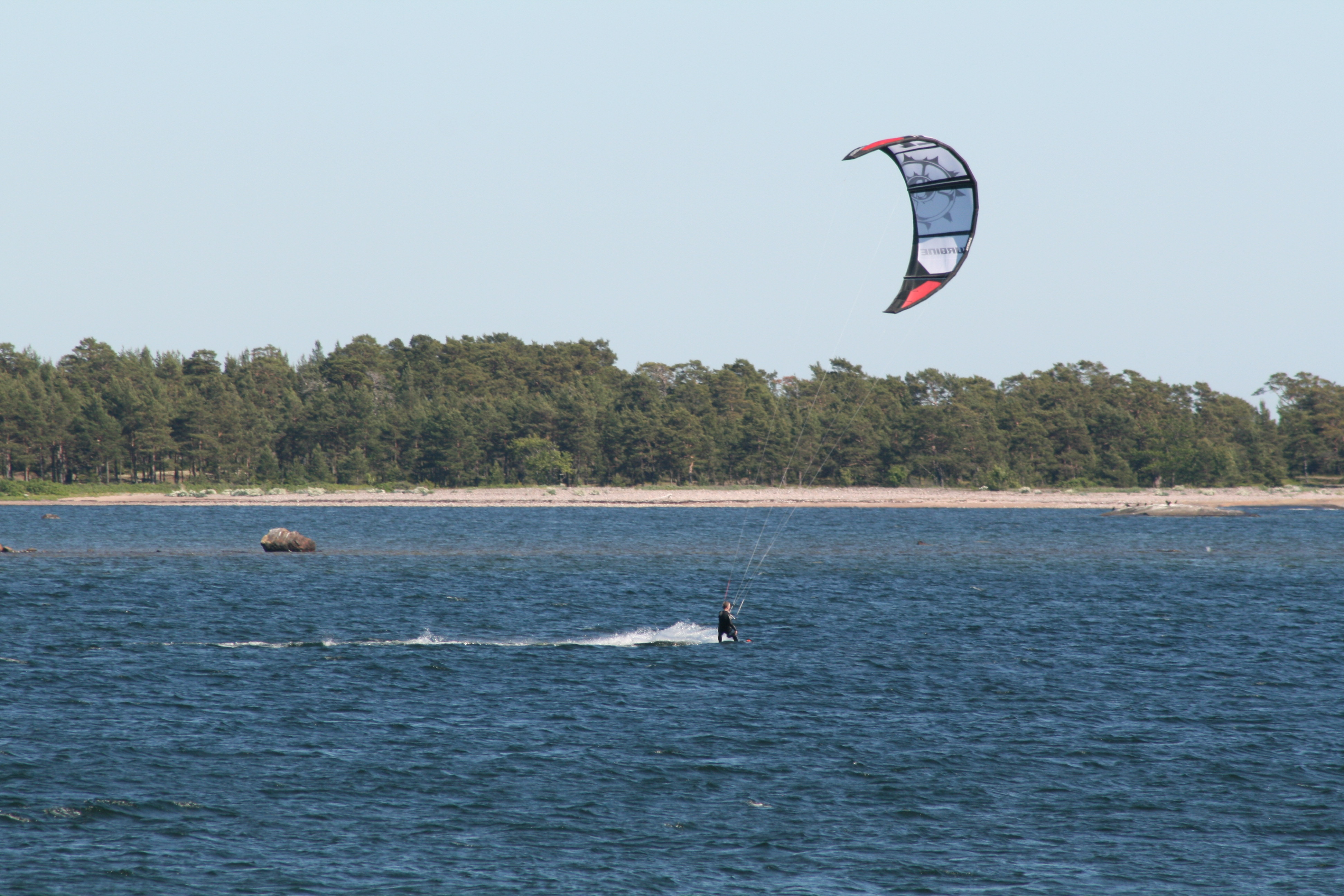 Leijalautailua Hangon Lilla Tallholmen ja Råuddenin välillä